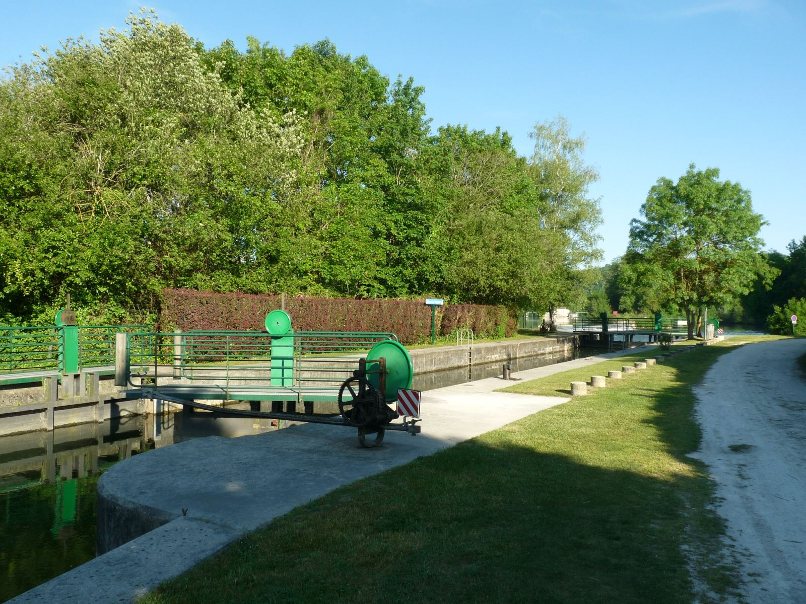 l'écluse de Touérat, St-Yrieix, Charente, France